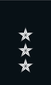 Kaptein